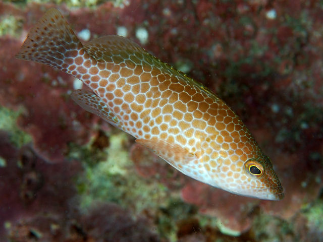 ホウセキハタ Epinephelus chlorostigma